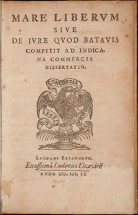 Mare liberum 1609